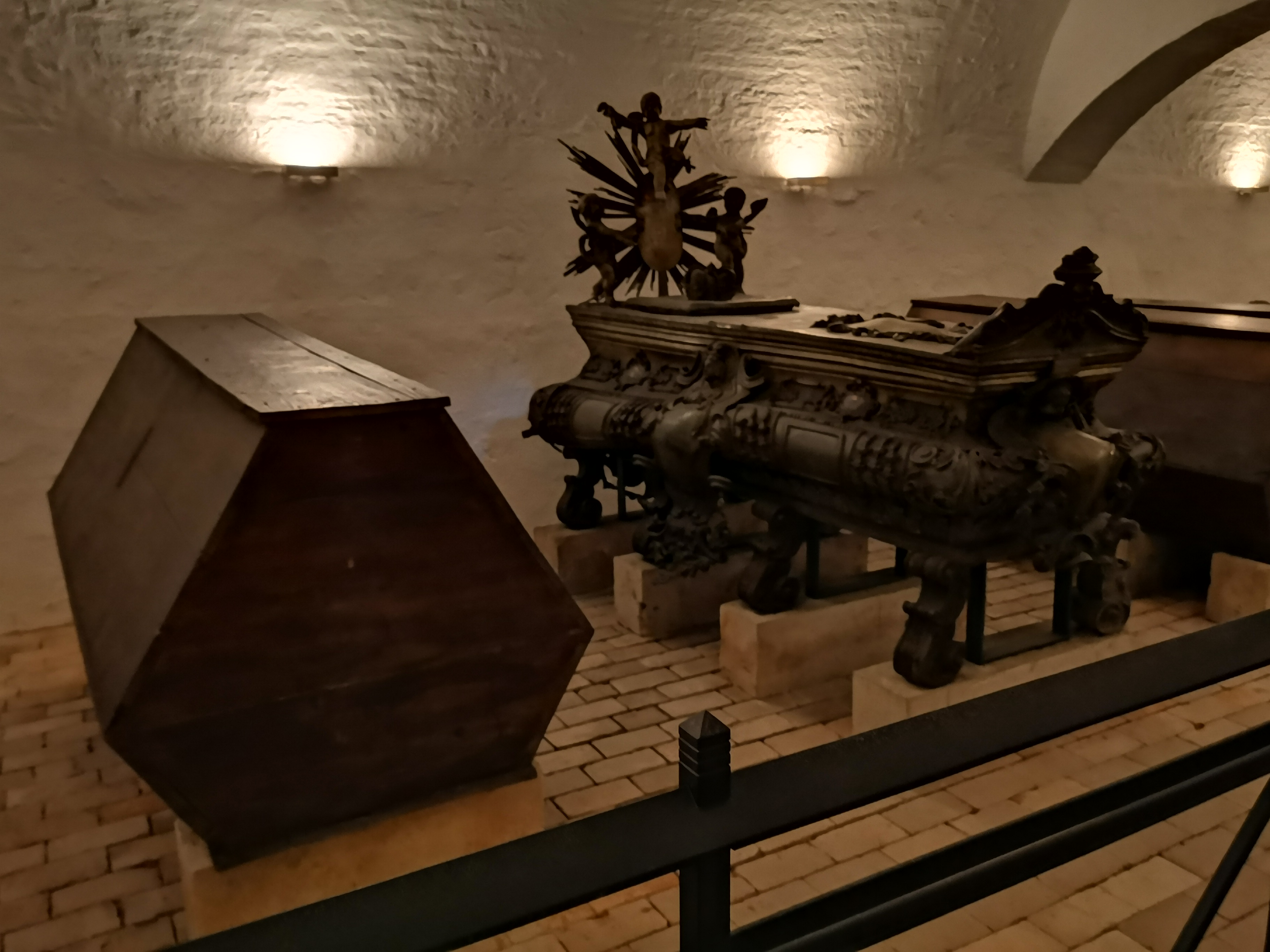 Fürstengruft Weimar; Sarg von Herzog Ernst August I. (1688–1748), Herzogin Eleonora Wilhelmina (1696–1726) und Herzog Wilhelm Ernst (1662–1728) (von links nach rechts)